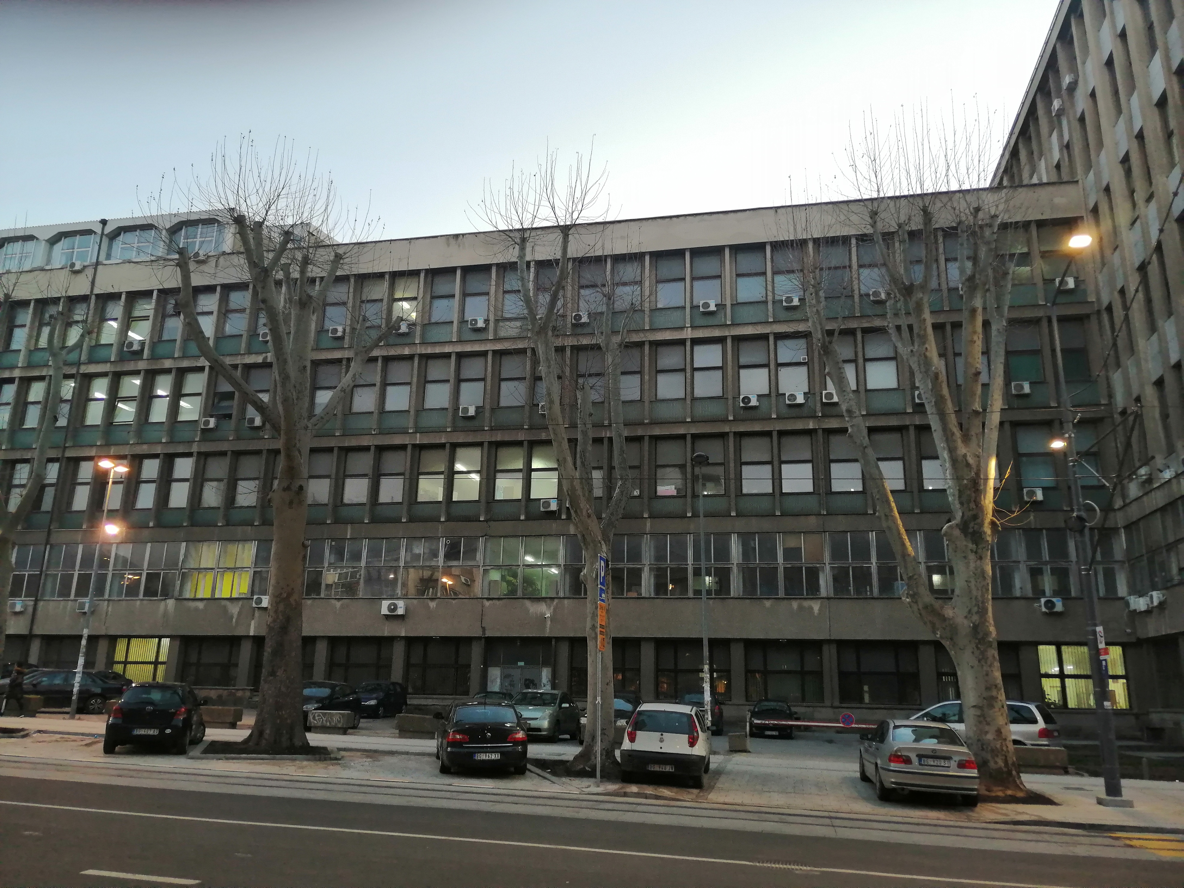 Srpski (latinica): Mašinski fakultet